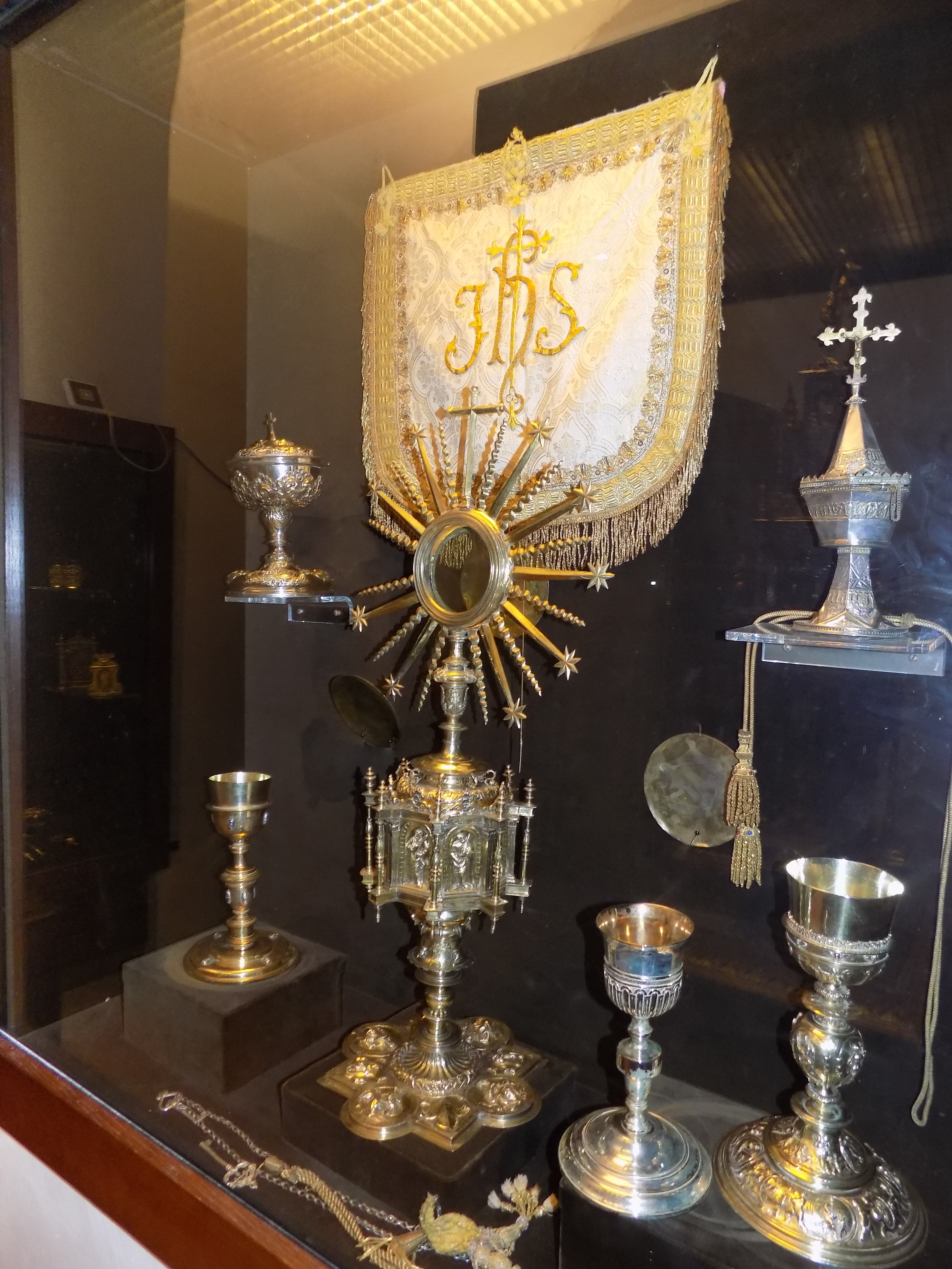 Custodia y cálices del tesoro parroquial de la iglesia de Nuestra Señora del Castillo de Fuente Obejuna, provincia de Córdoba, (España).